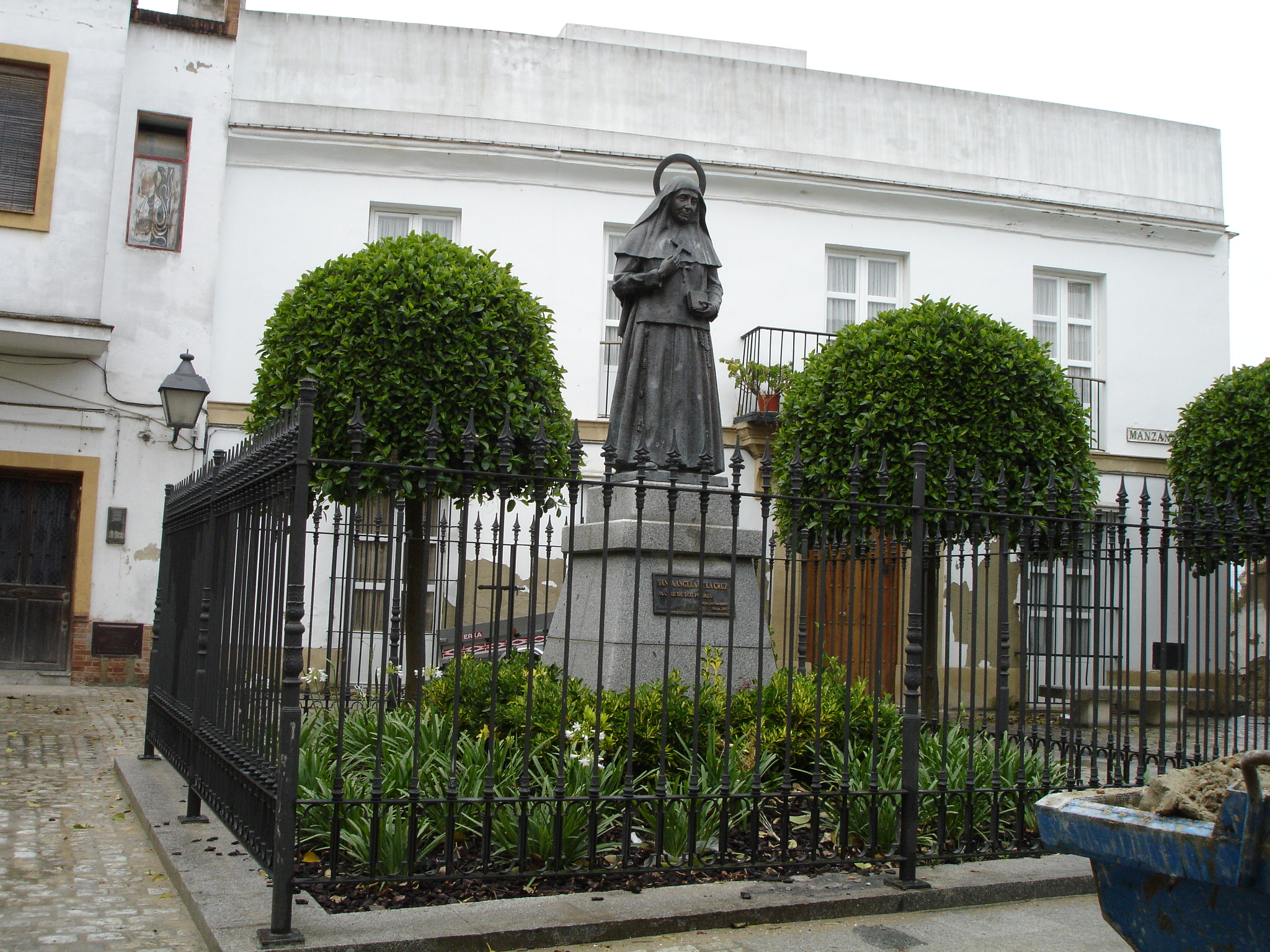 Monument to Santa Ángela de la Cruz